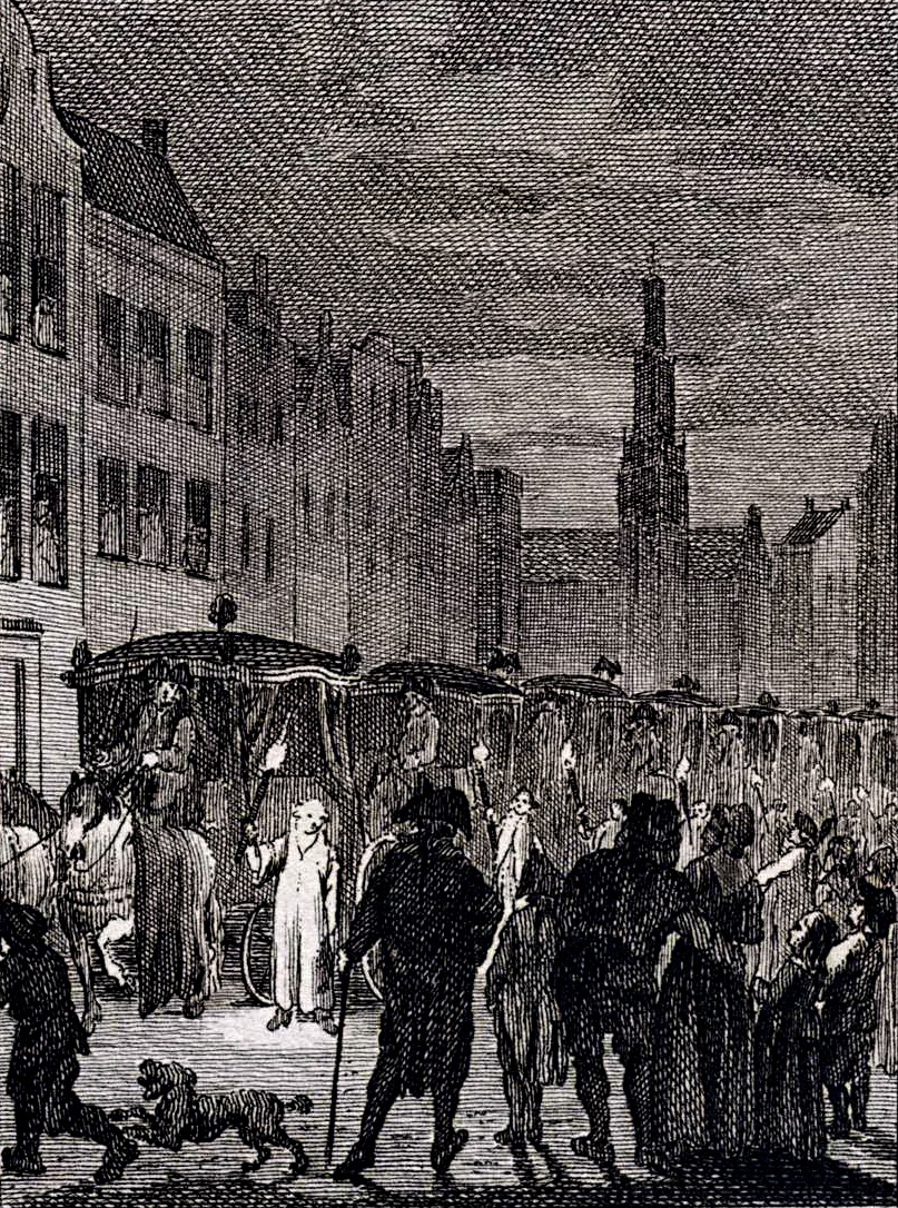 Begrafenis van de Franse marquis de Maillebois te Maastricht, 17 december 1791. Begrafenisoptocht met stoet van rijtuigen begeleid door pages te voet met fakkels. Gravure van Reinier Vinkeles naar een tekening van Cornelis Bogerts/Jacobus Buys. Gebruikt als illustratie in: J. Fokke, Geschiedenissen der Vereenigde Nederlanden voor de vaderlandsche jeugd, Johannes Allart, Amsterdam, 1783-1795. Collectie Rijksmuseum Amsterdam.